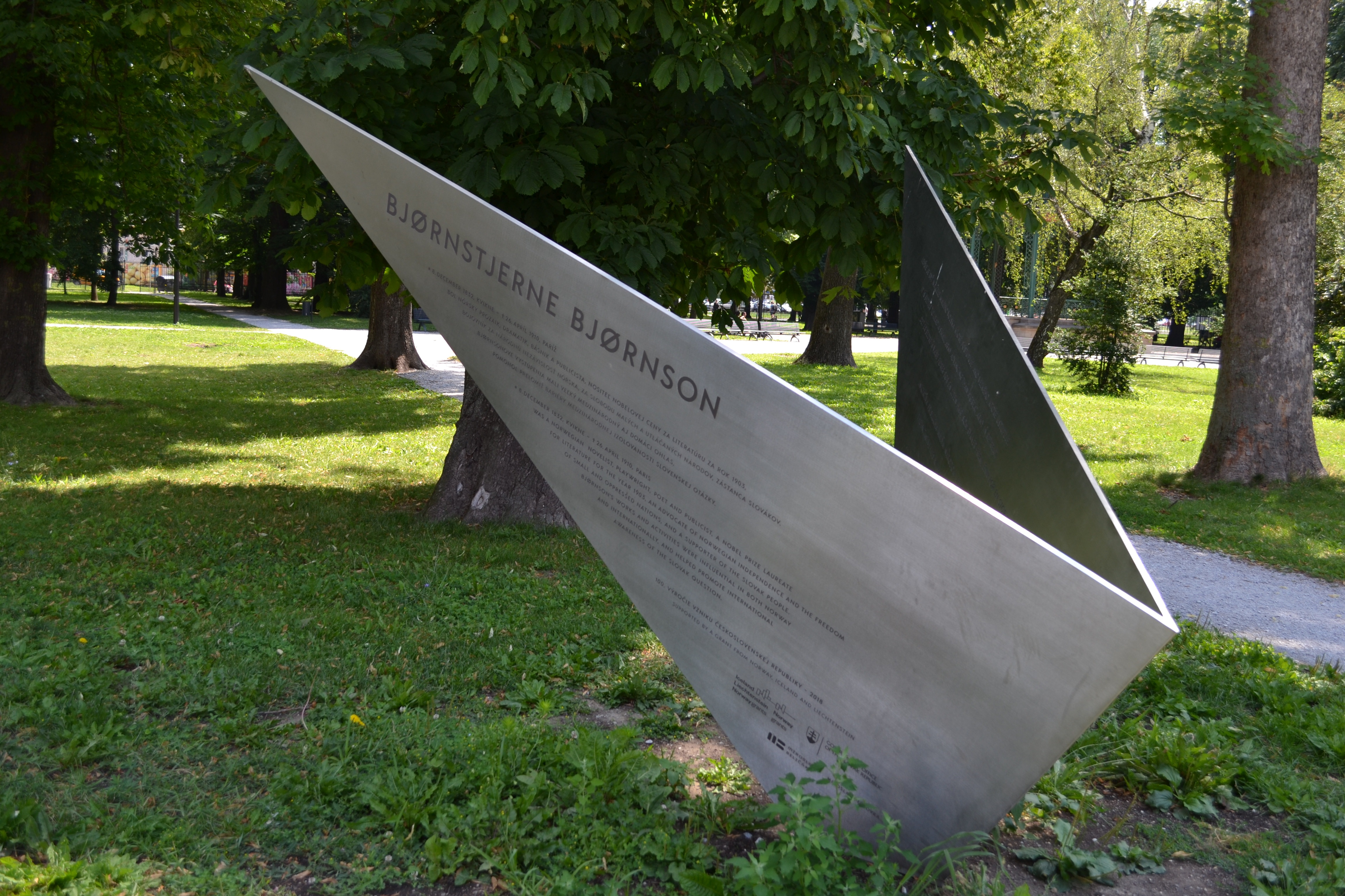 Košický Mestský park, pamätník svetoznámemu Nórovi Bjørnstjerne Bjørnsonovi, považovaného za významného medzinárodného obhajcu práv Slovákov v časoch národnostného útlaku.